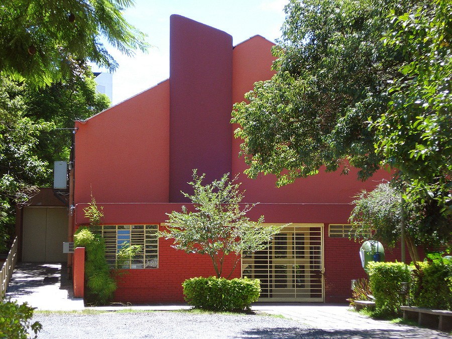 Teatro de Cãmara Túlio Piva, Porto ALegre, Brasil.